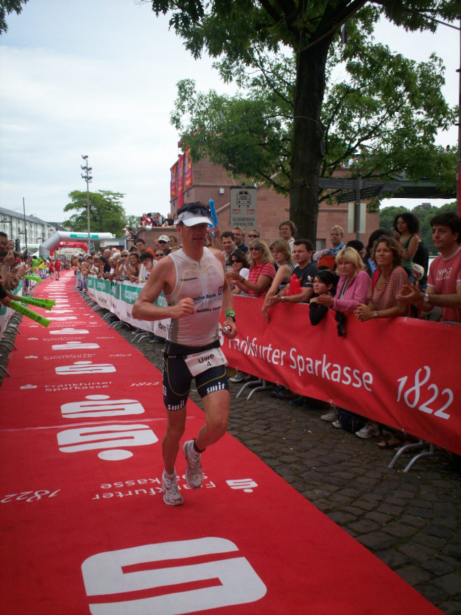 Ironman Germany 2007: Uwe Widmann nach dem Wechsel vom Rad zum Laufen